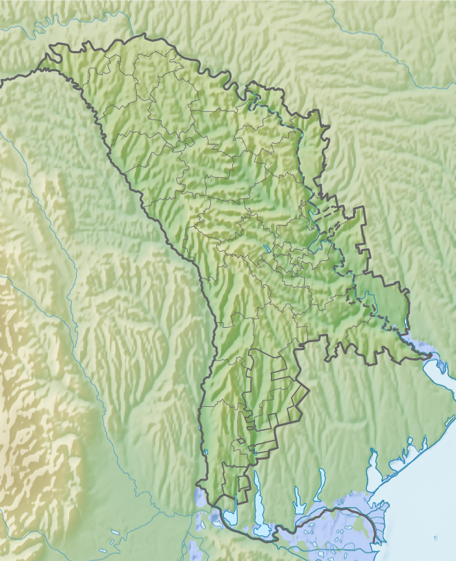 Физическая карта Молдавии.